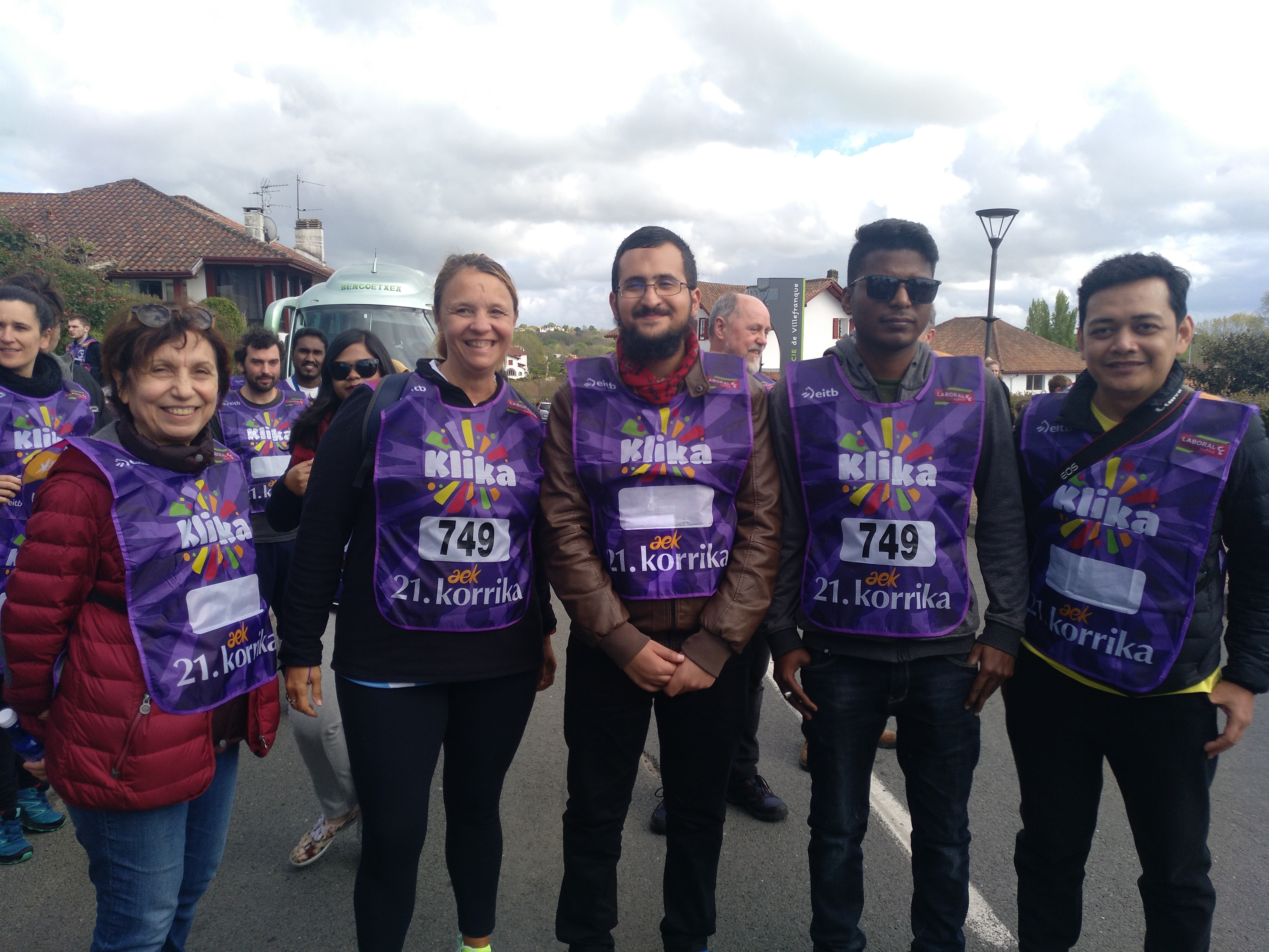 Wikimedia+Hezkuntza konferentziako argazkiak